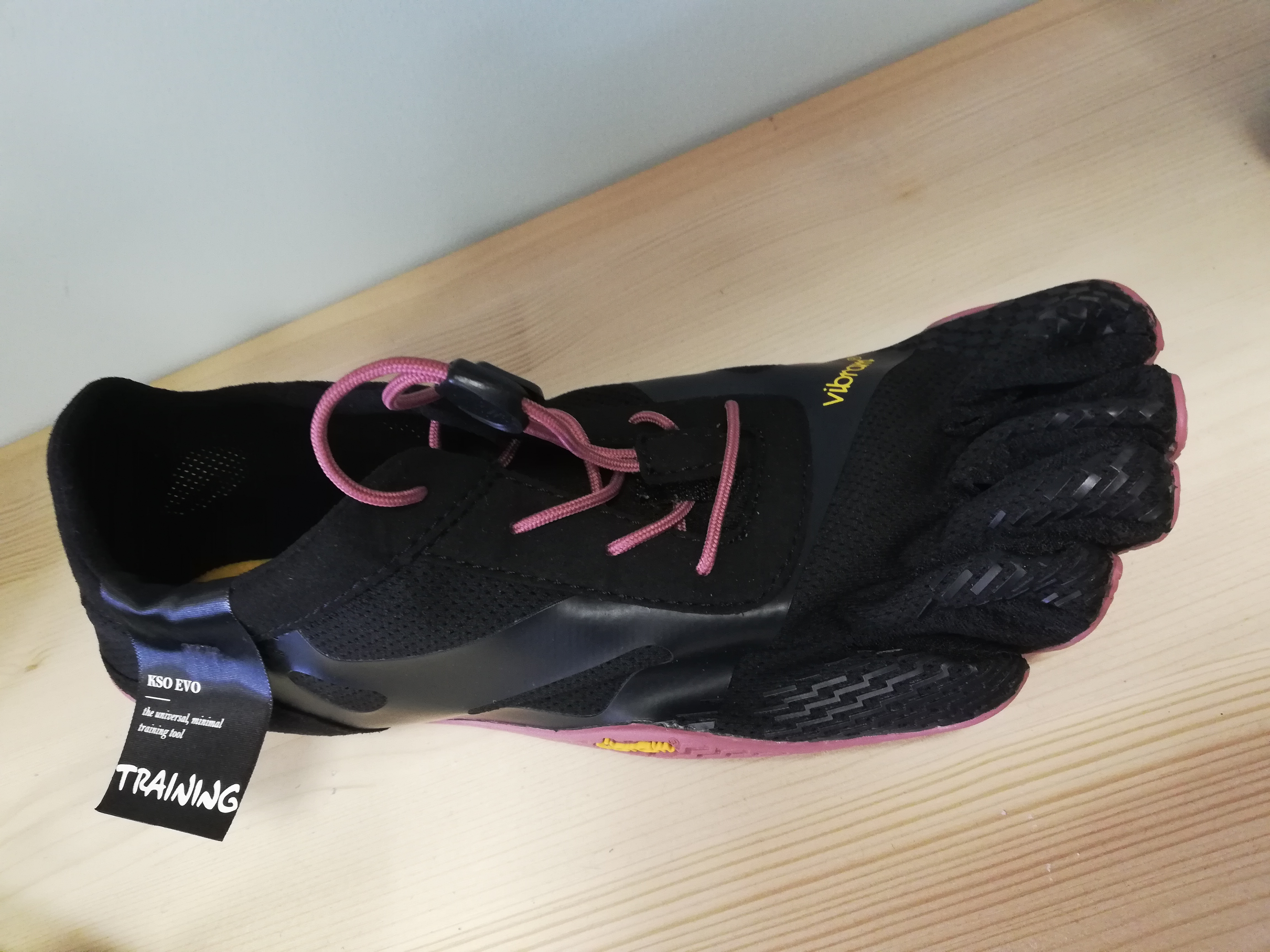 vibram fivefingers